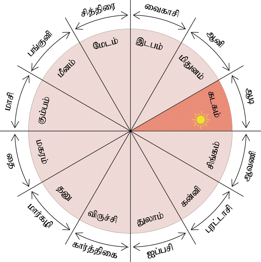 Drawn by the user who uploaded this.